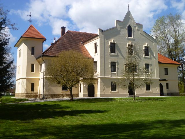 Schloss_Mamling_heute